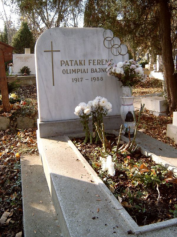 Pataki Ferenc (Budapest, 1917. szeptember 18. – Budapest, 1988. április 25.) olimpiai bajnok tornász sírja Budapesten. Farkasréti temető: 8/2-1-106.